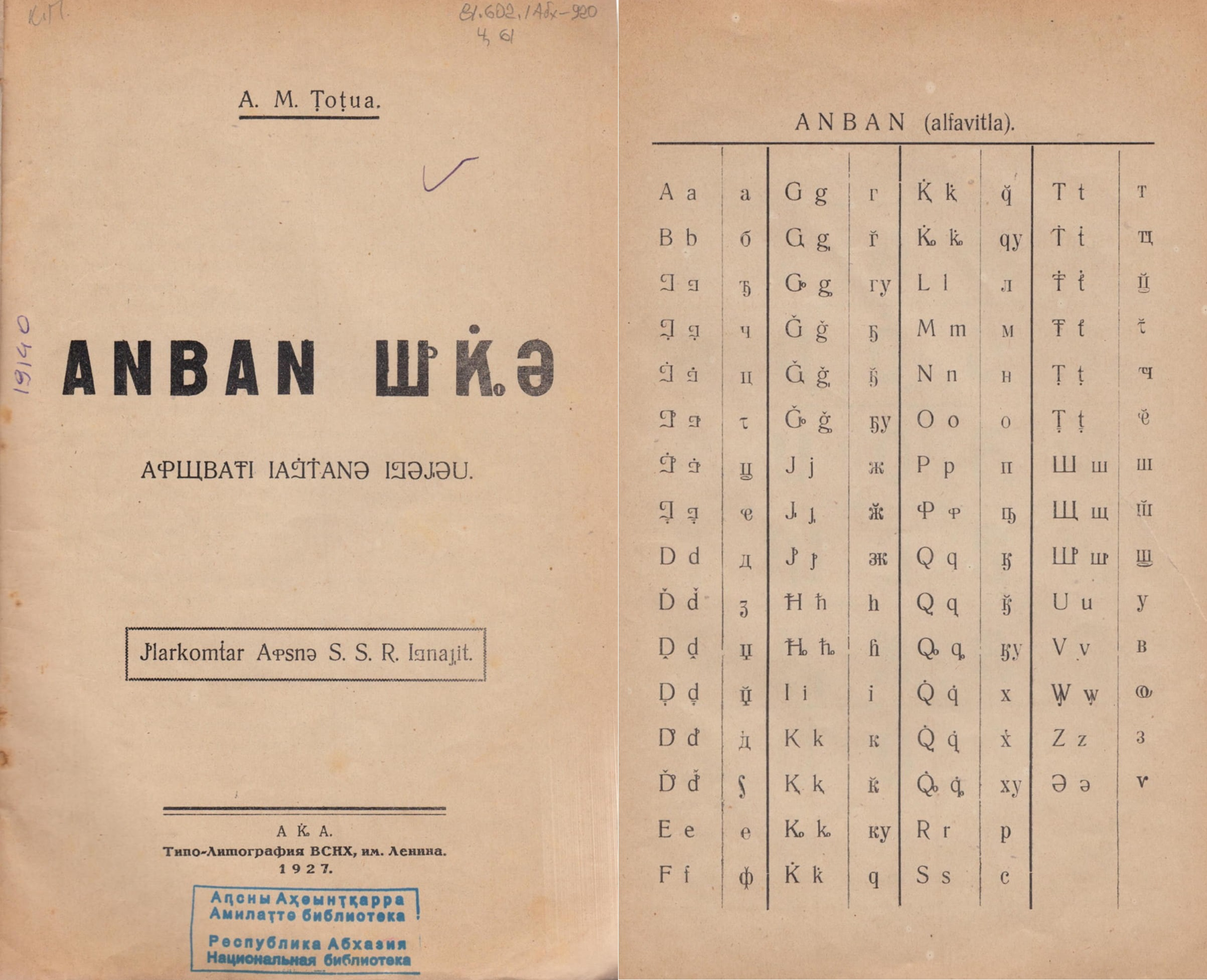 Abkhaz alphabet by Marr (1926-1928)